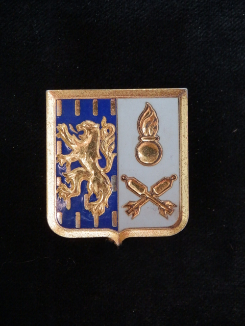 Insigne des Établissement de Réserve Générale de Munitions de Chemilly-sur-Yonne.